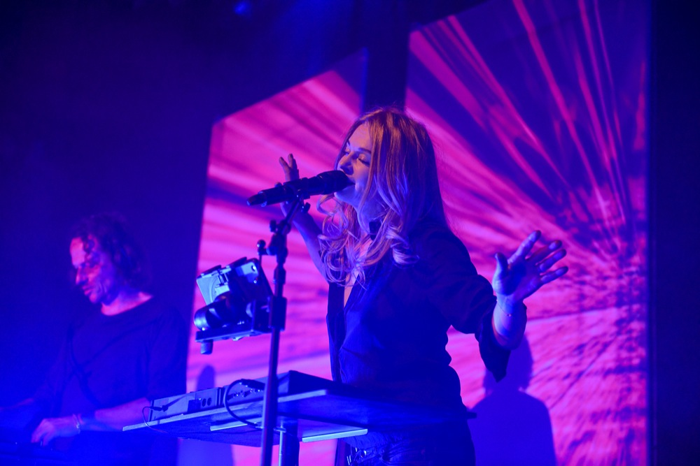 Konzert von 2raumwohnung in Darmstadt